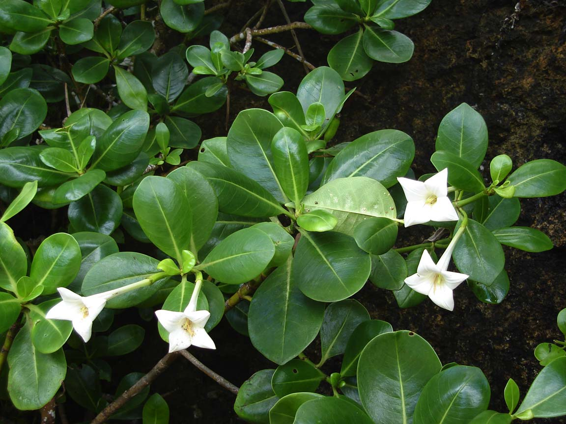 Bikkia tetrandra (siale tafa) on Tongatapu